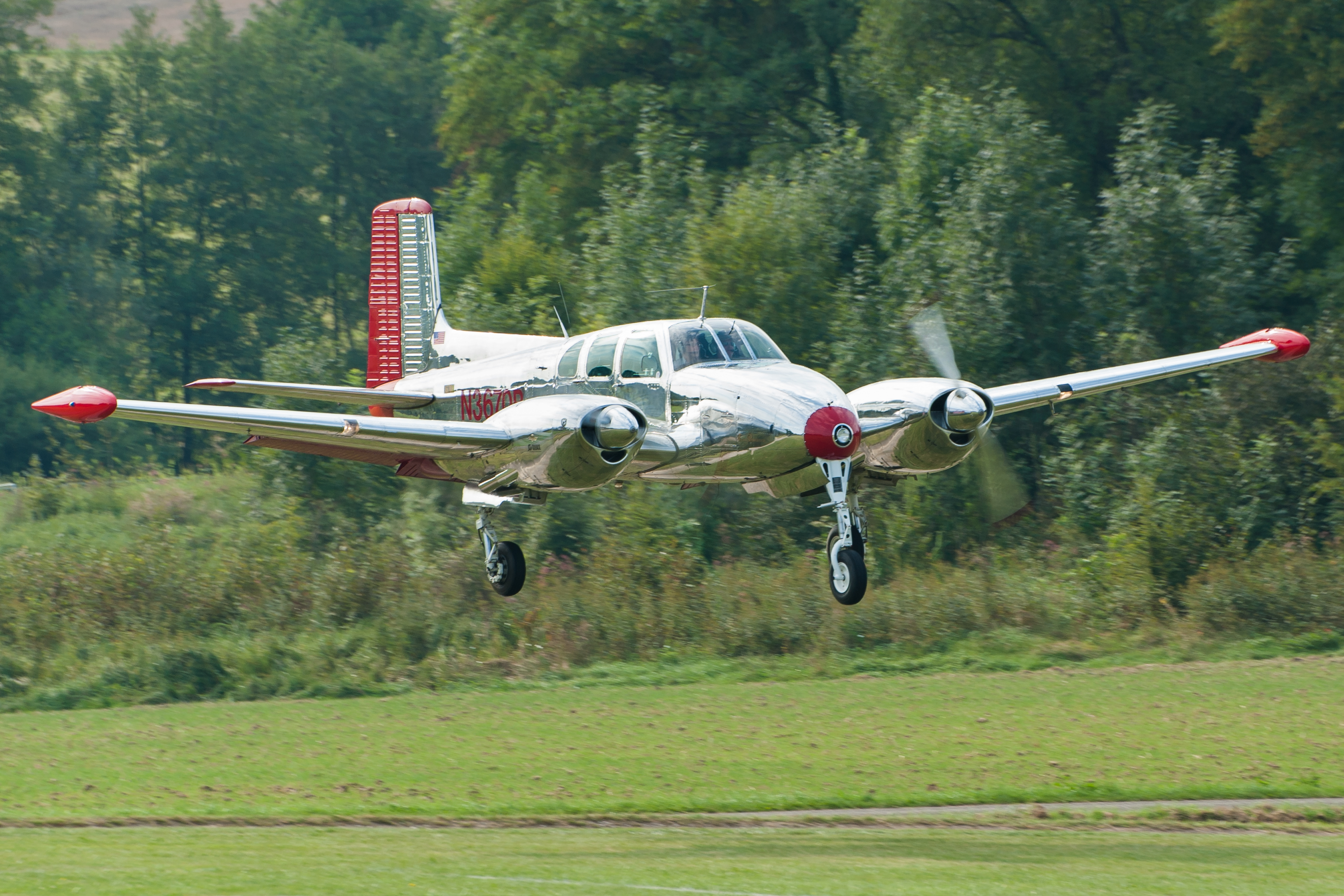 Dieses Foto wurde beim Oldtimer Fliegertreffen, 2013 am Flugfeld Hahnweide bei Kirchheim unter Teck aufgenommen. Es zeigt eine Beech B50 im Landeanflug.